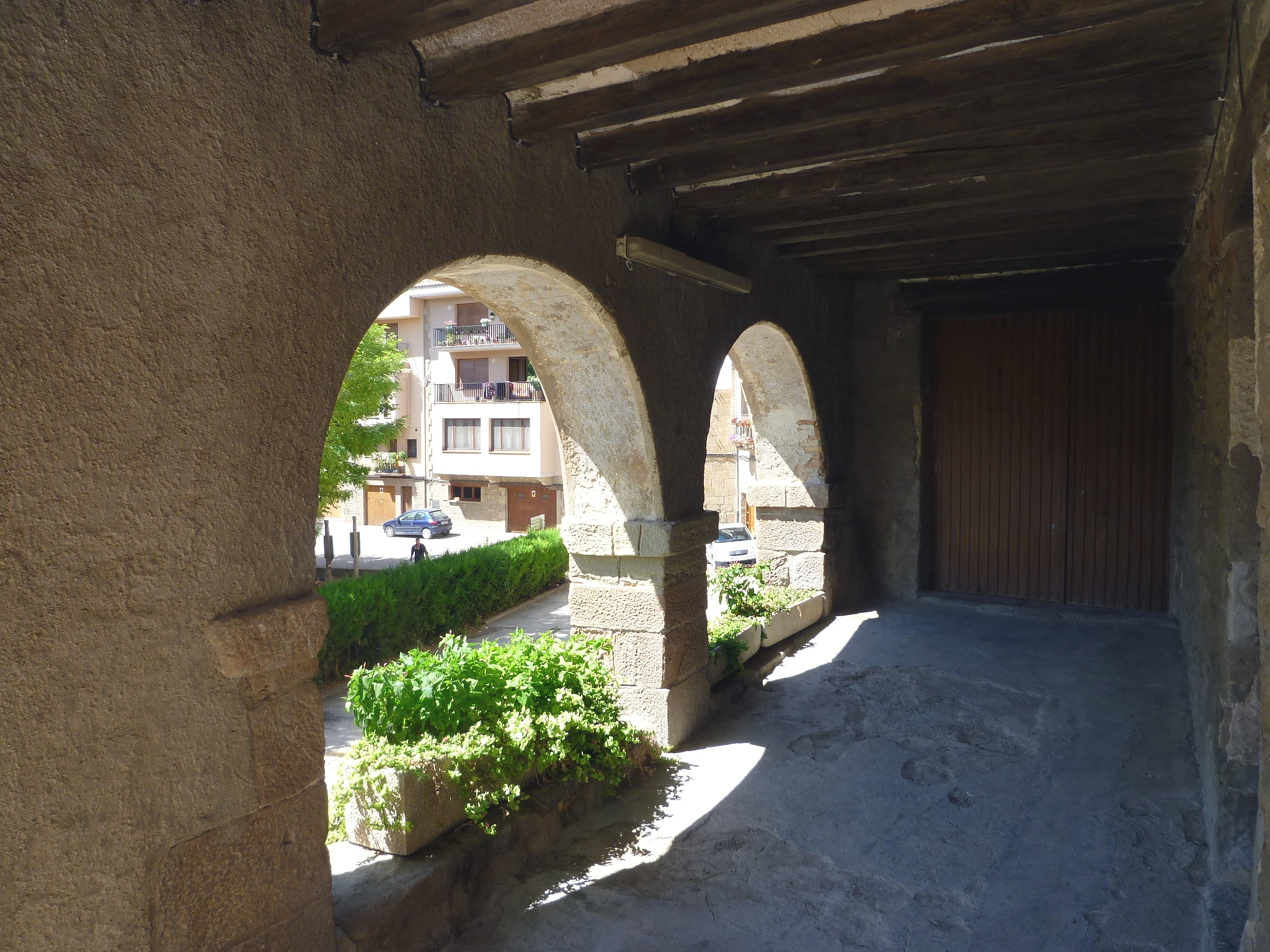 Cal Jovanics, a la plaça de la Font de Torà (Segarra)